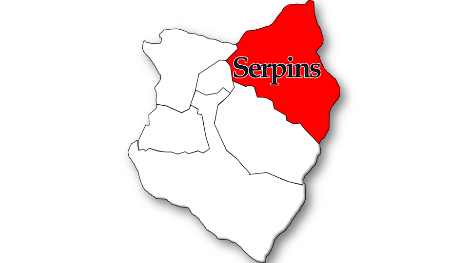 População